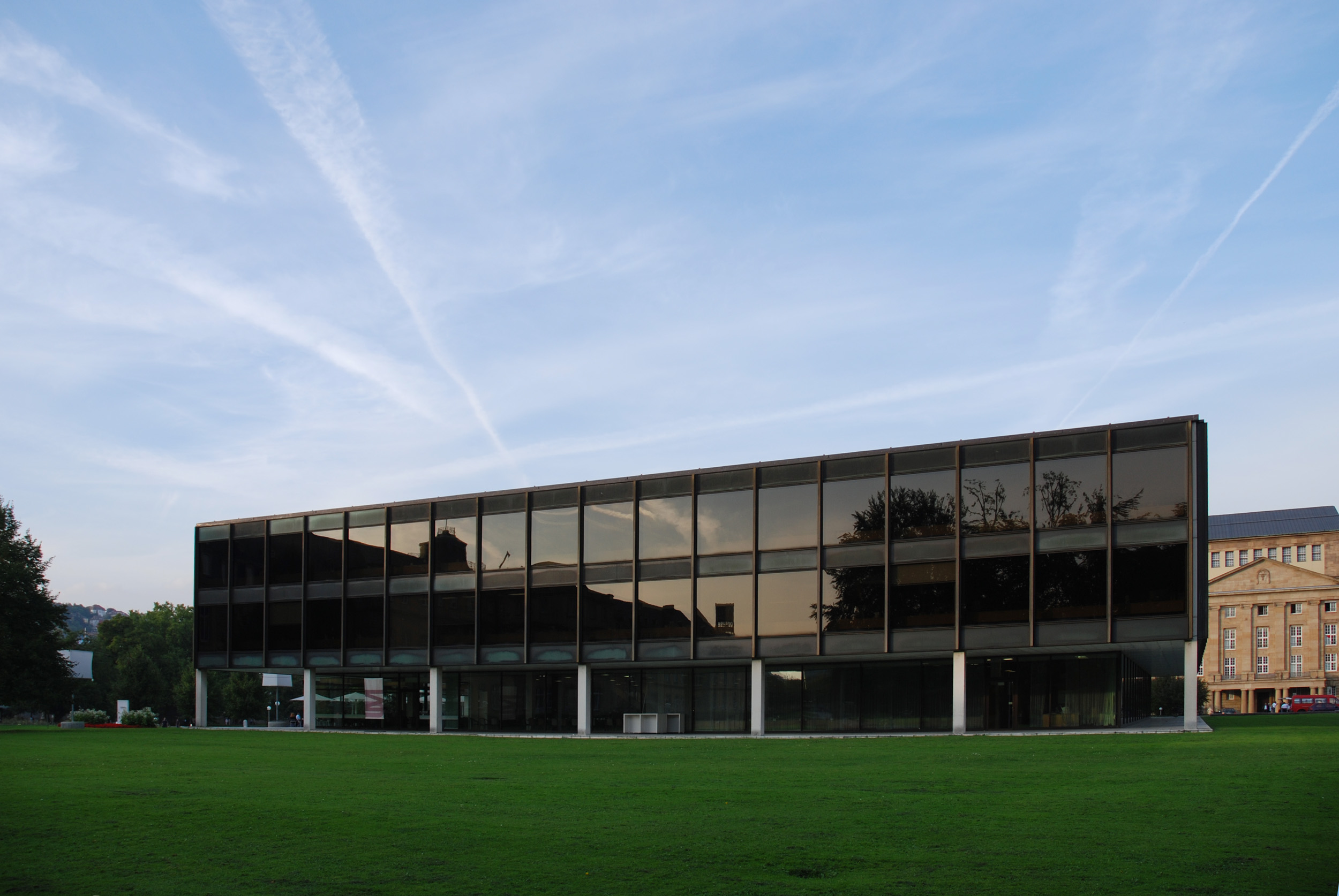 Landtagsgebäude Baden Württemberg, Stuttgart (mit Kondensstreifen)